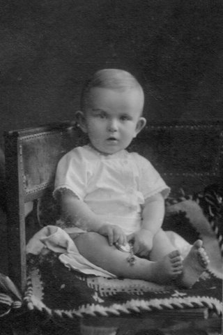 Роман Шухевич немовлям.